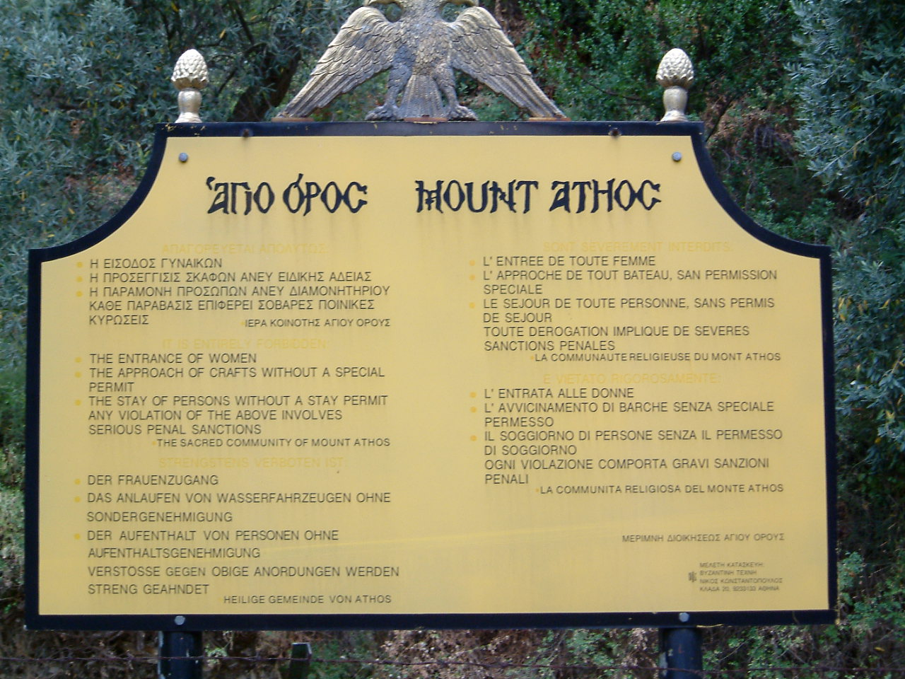 Grenze zu Athos bei Ouranoupolis, inkl. Verbotsschild für Frauen Sonstiges: Selbst fotografiert. Das Fotografieren ist erlaubt.